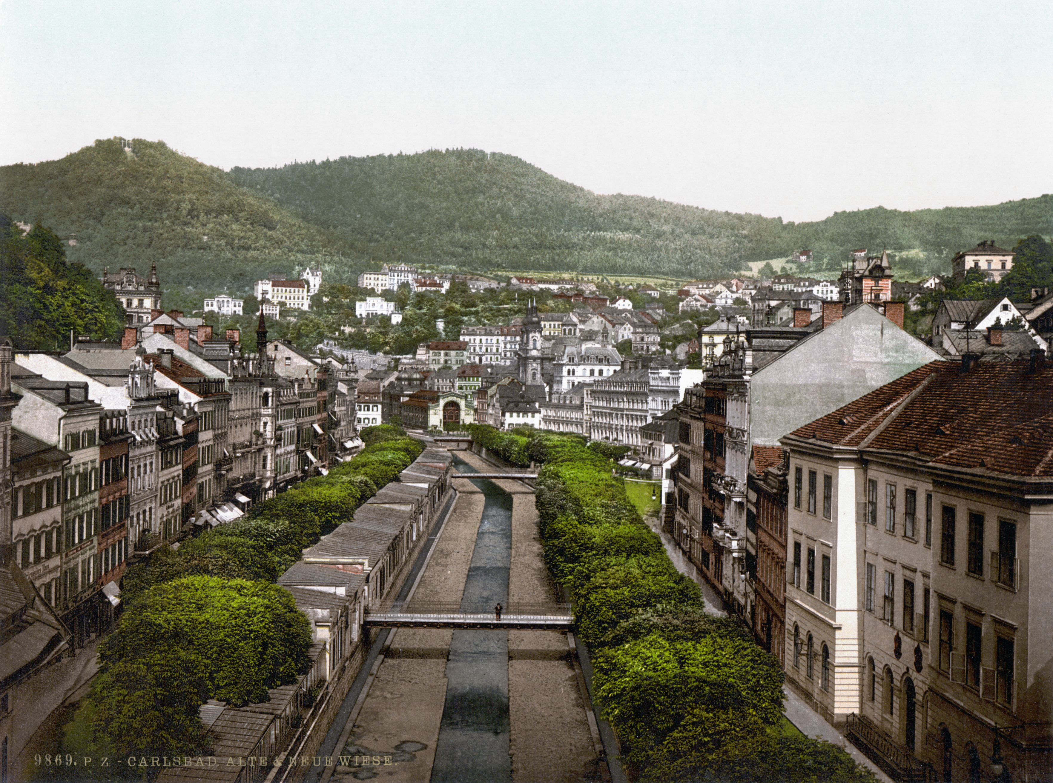 Stará a Nová Louka v Karlových Varech kolem roku 1900.